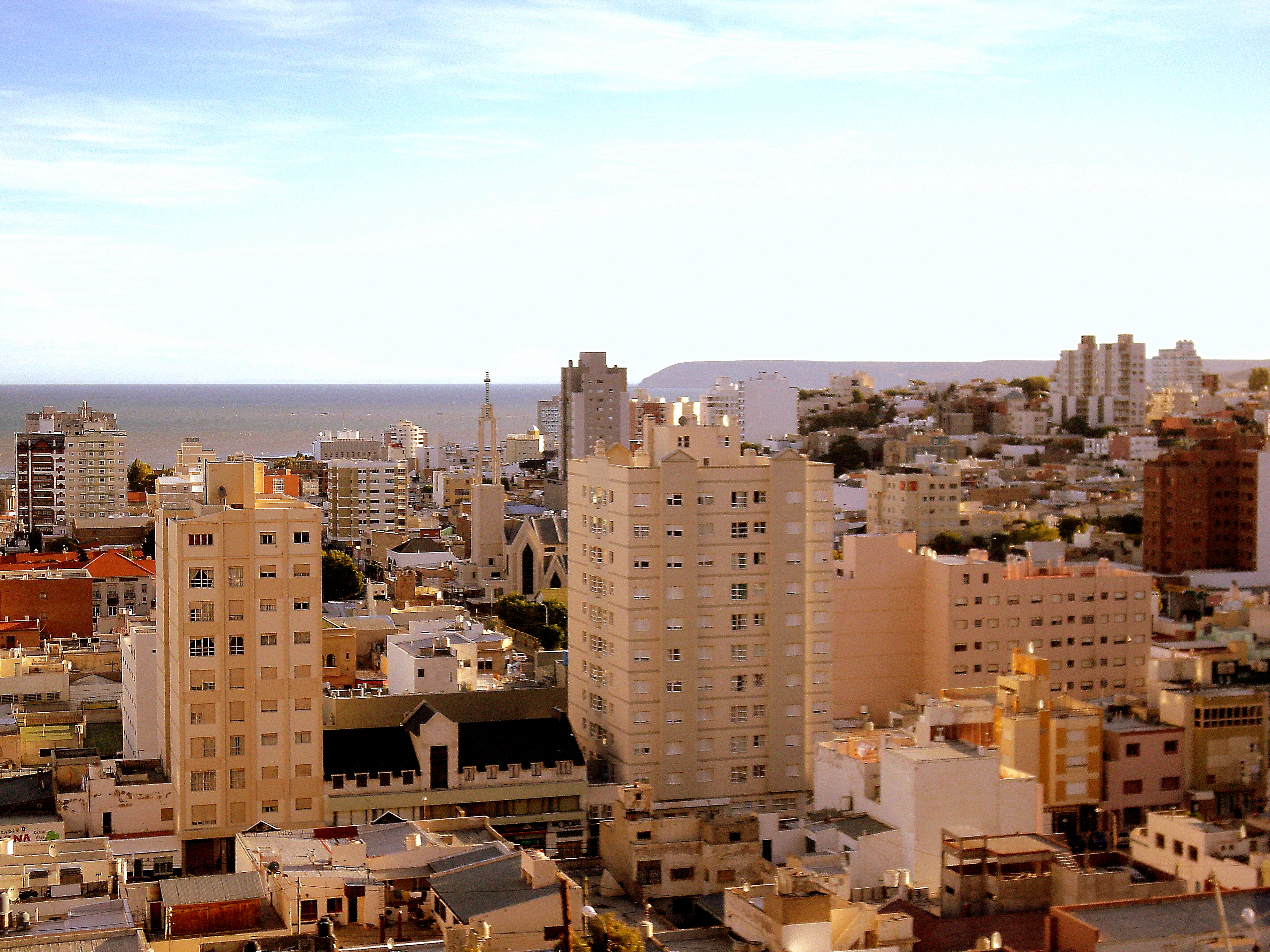 La catedral rodeado de edificacion de altura, solo sobrepasada por Los Alamos 2 de 15 pisos. Comodoro Rivadavia.